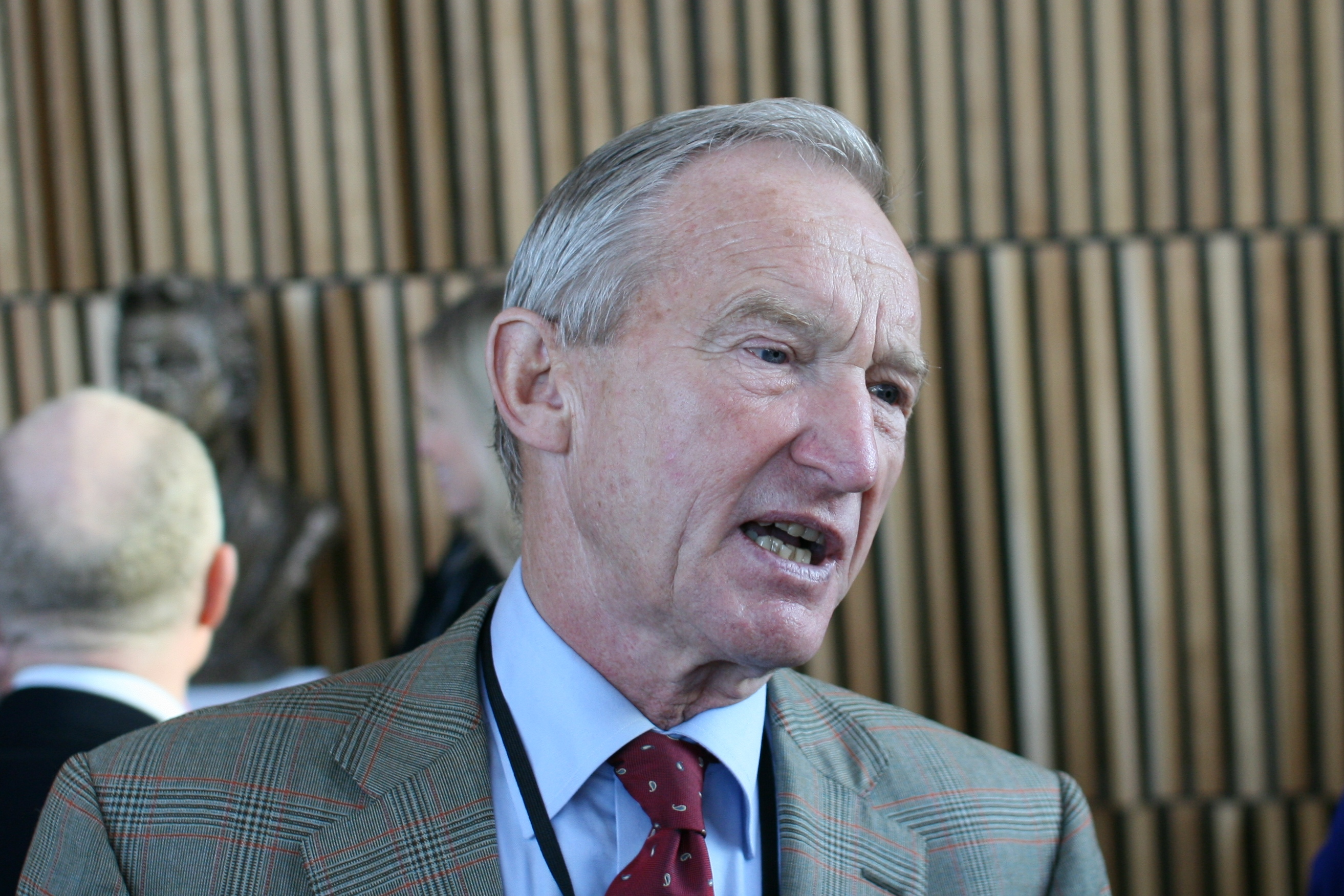 Karl Glad, NHO-direktør 1990-98. Fra NHOs Årskonferanse 2009.